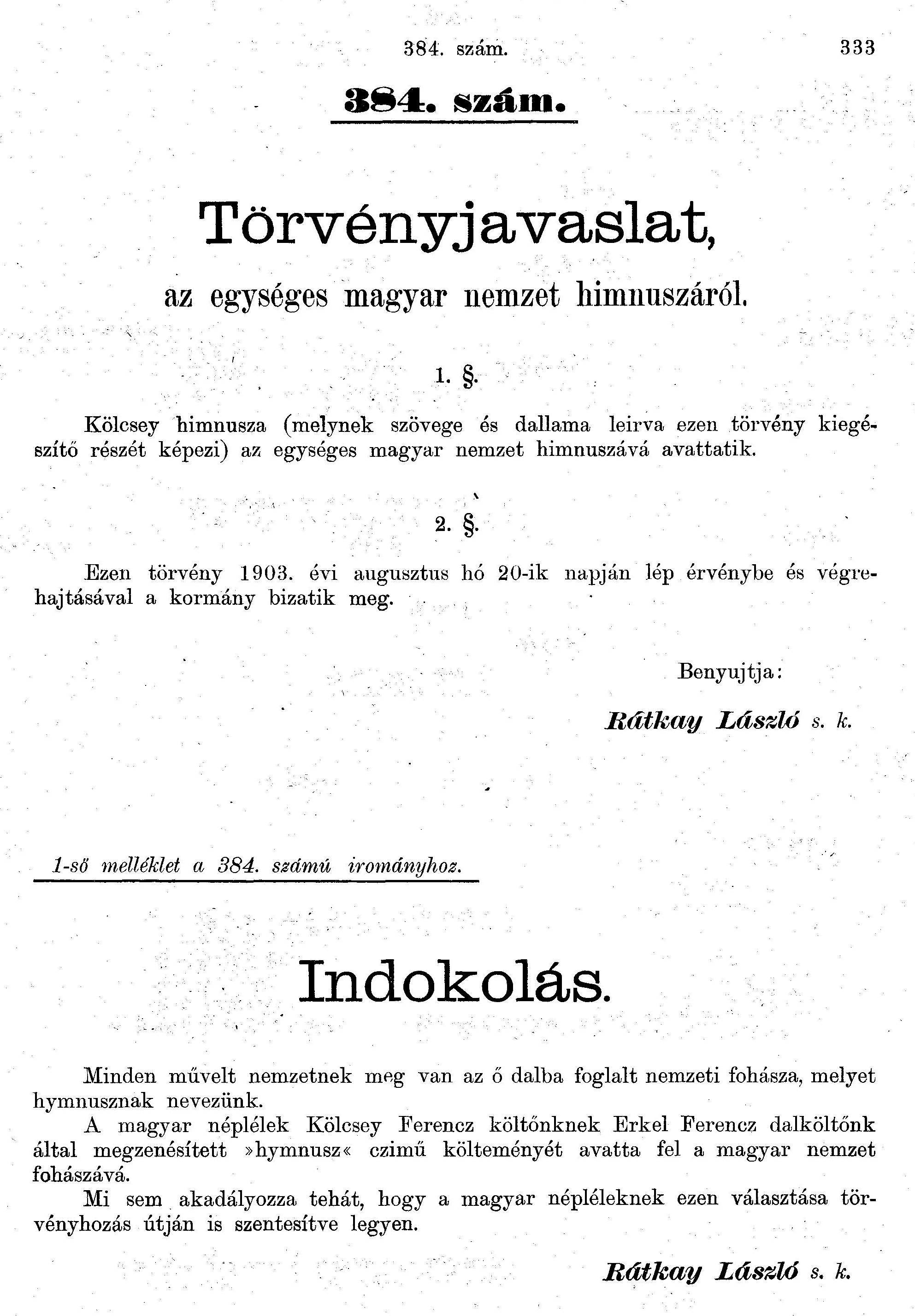 Képviselőházi irományok 1903. 384.számú iromány Törvényjavaslat, az egységes magyar nemzet himnuszáról.